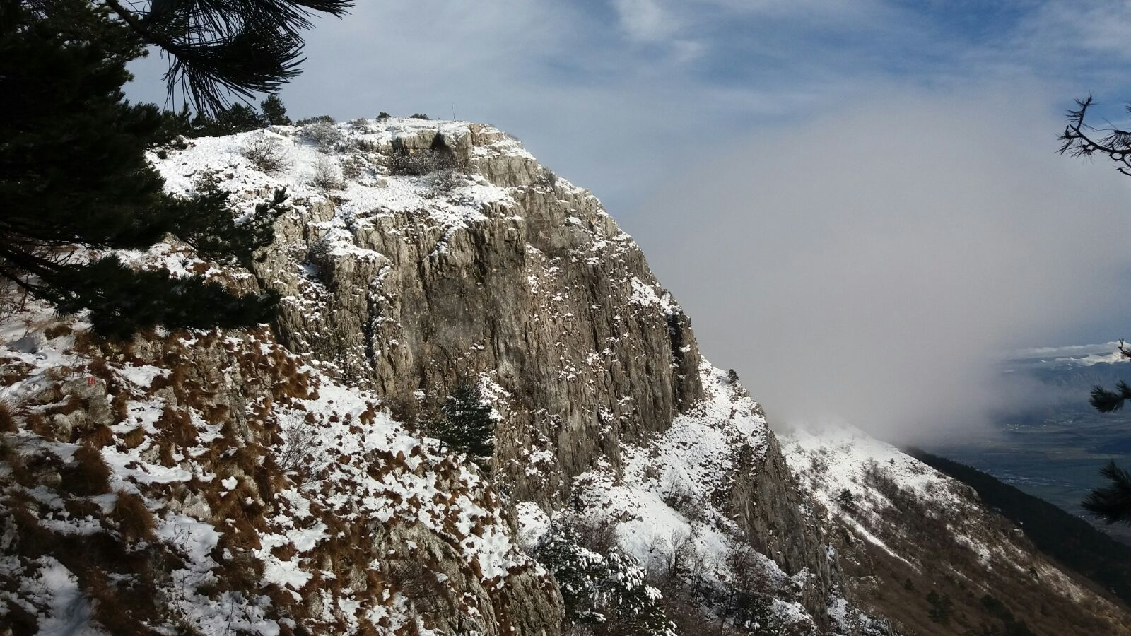 Vista della cima del monte Gran Ciglione in Slovenia